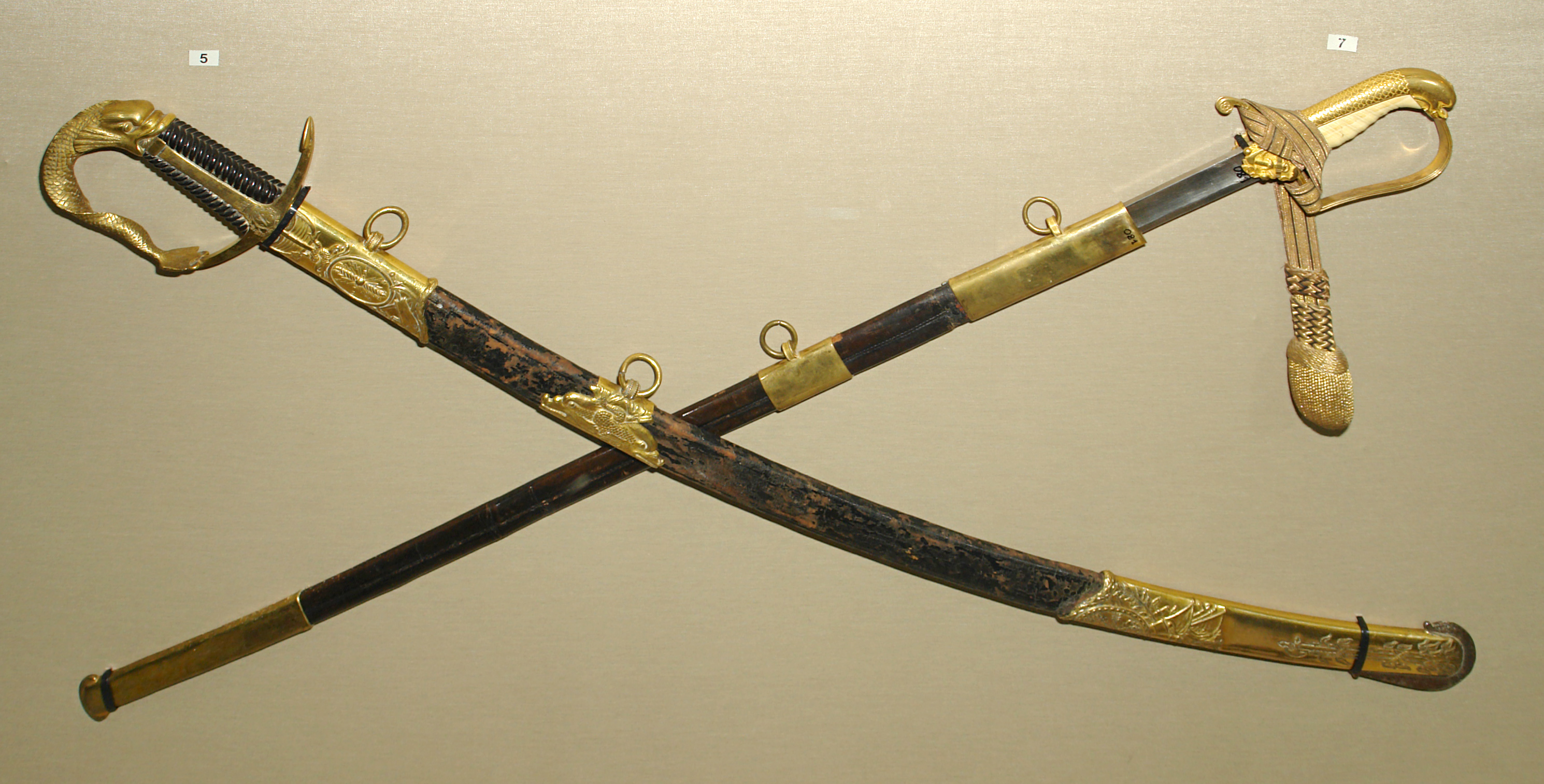 5. Сабля шведская морская офицерская подарочная от кронпринца Карла Йохана (будущего короля Карла XIV). 7. Сабля шведская морская офицерская обр. 1824 г.